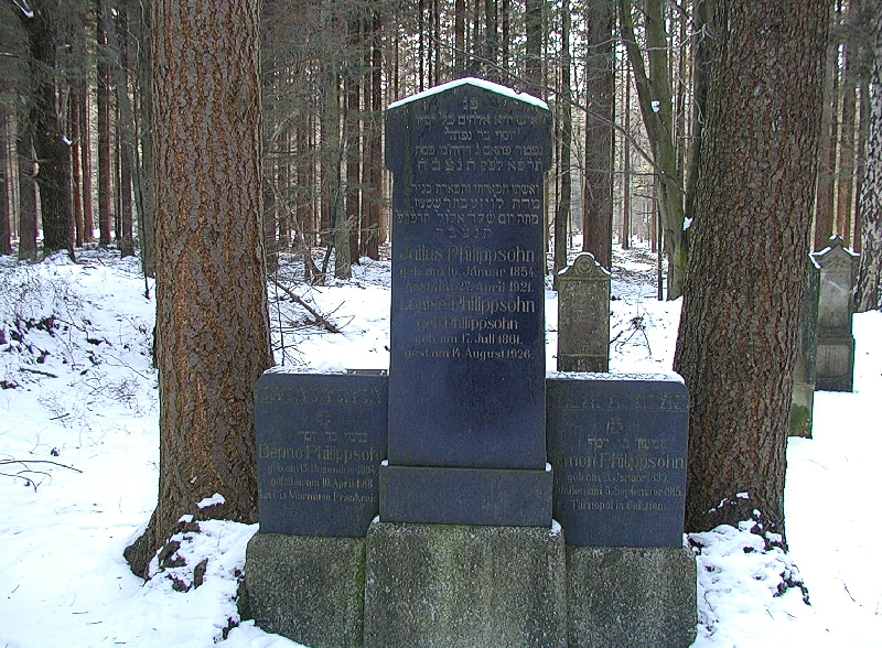 Der Jundenfriedhof in im Wingster Wald zwischen Cadenberge und dem Wasserwerk Wingst